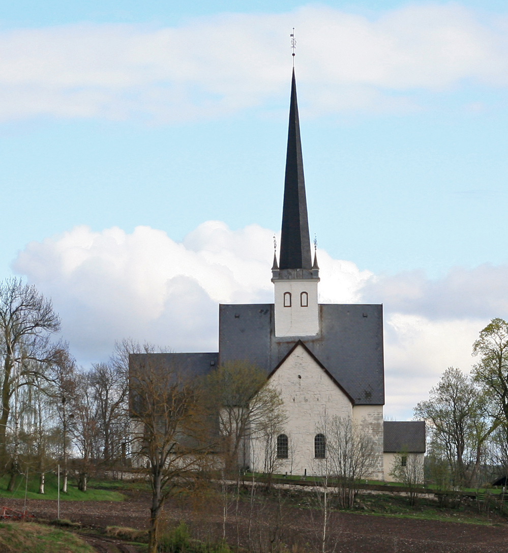 Stange kirke, sett fra nord